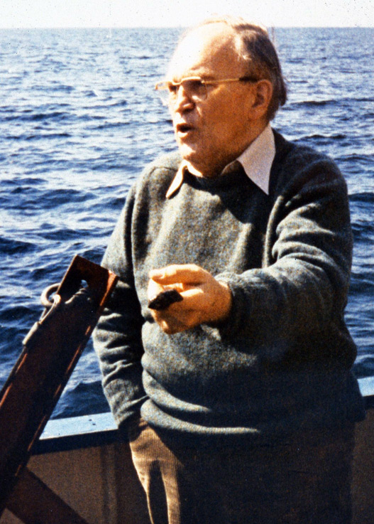 Prof. Dr. Dr. Eugen Seibold, Geologisches Institut, Christian-Albrechts-Universität, Kiel, Germany, on bord research vessel Littorina